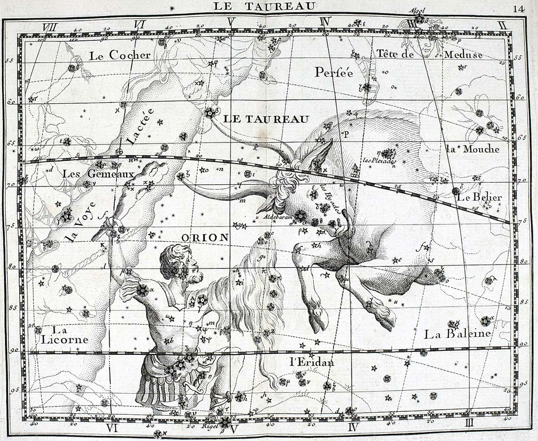 Atlas Coelestis